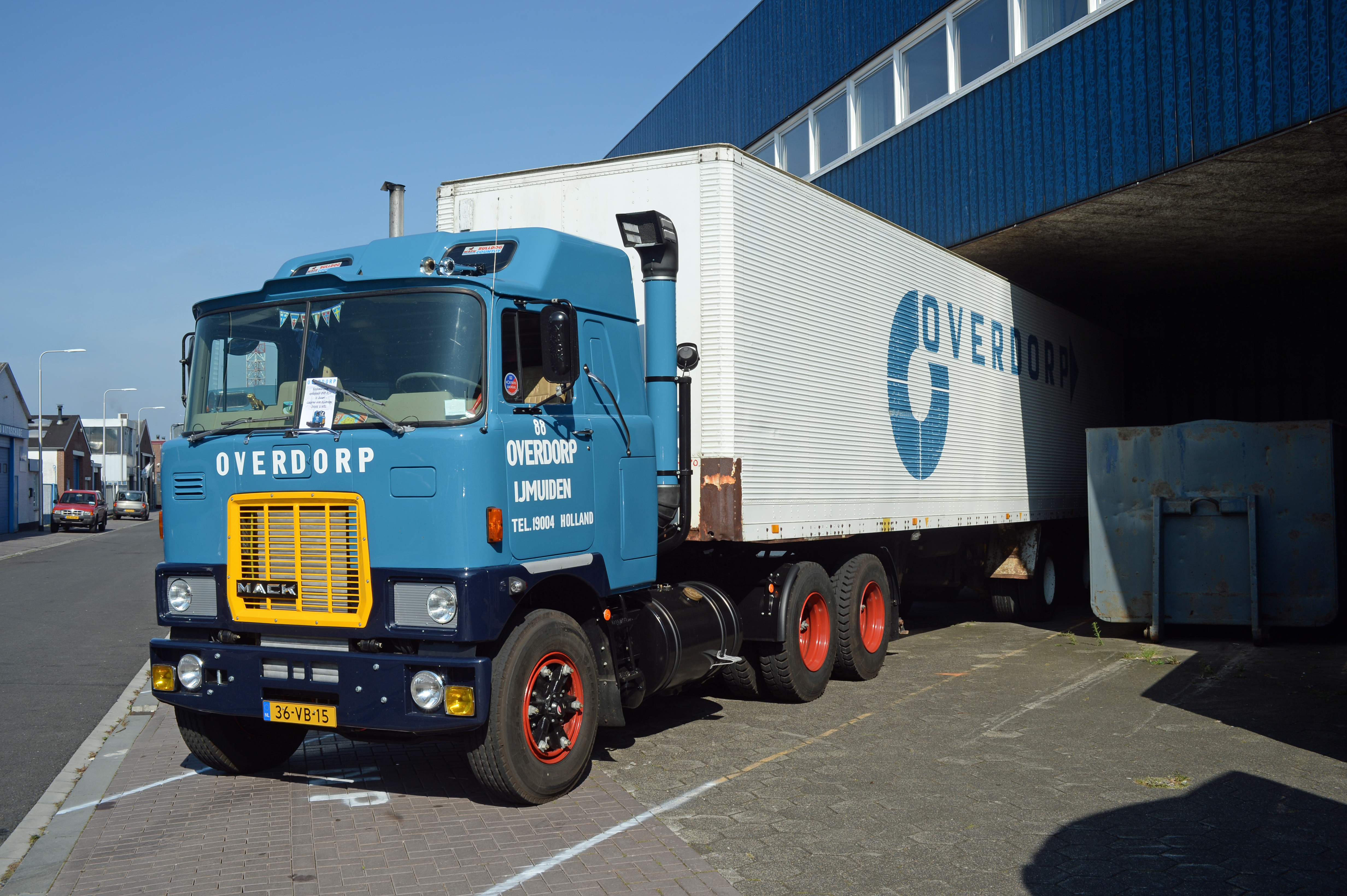 1980 Mack F 786 ST Overdorp IJmuiden T88 Trailer Overdorp opl 059